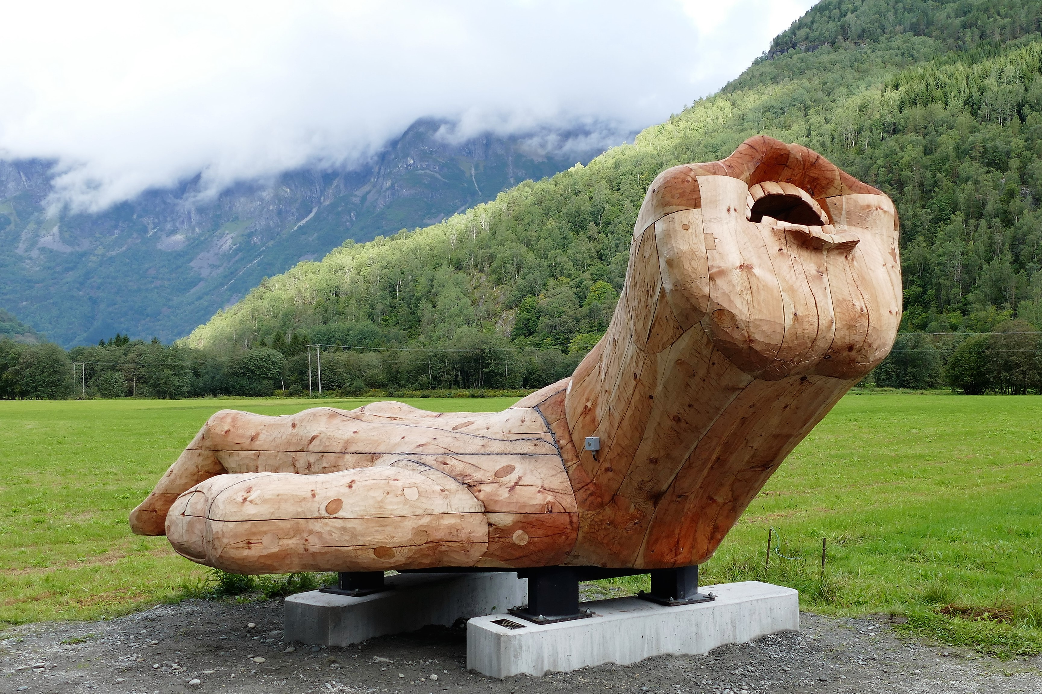 Wittgenstein-monumentet er et kunstnerisk prosjekt av Sebastian Makonnen Kjølaas, Marianne Bredesen og Siri Hjorth.